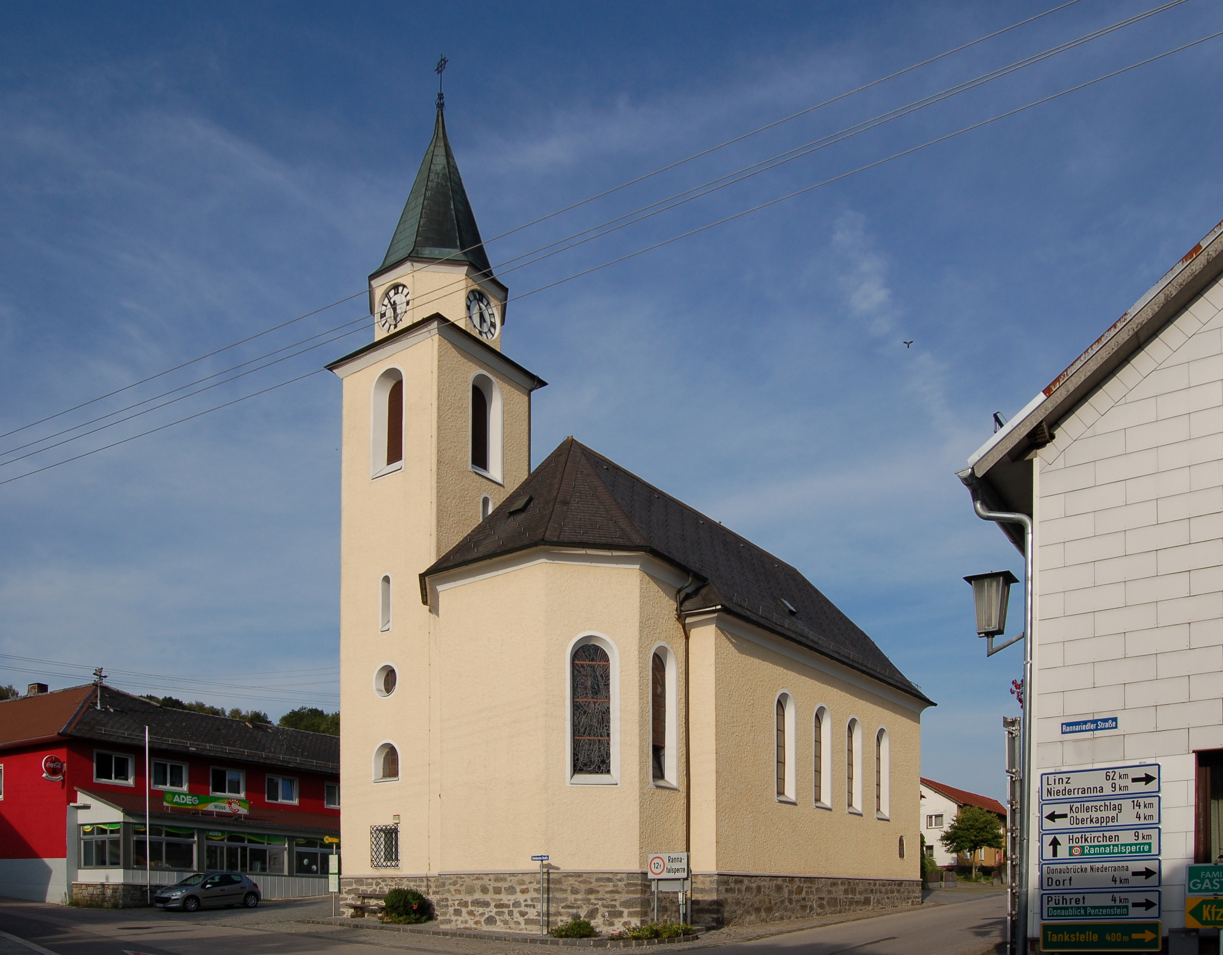 Die Kirche Maria Empfängnis in Neustift im Mühlkreis im Bezirk Rohrbach (Oberösterreich). Die Expositurkirche in Neustift wurde zwischen 1948 und 1950 an der Stelle einer 1869 errichteten Kapelle gebaut. Es handelt sich bei dem Neubau um einen schlichten, historisierenden Saalbau mit polygonalem Chor, Walmdach und markantem Turm. Die Einrichtung stammt großteils aus der Zeit um 1950.